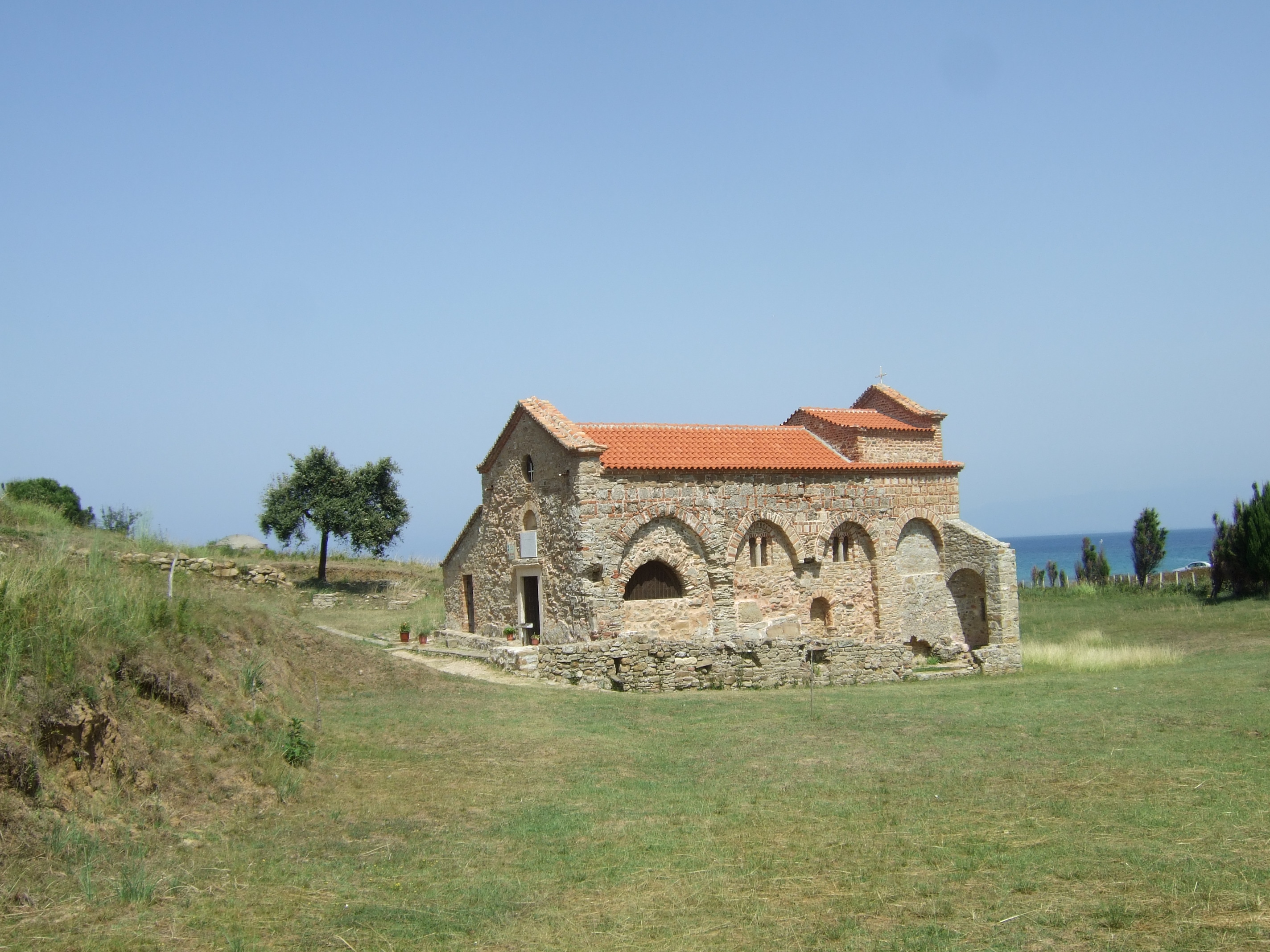 Kisha e Shen Ndojit (GeRMADHAT)